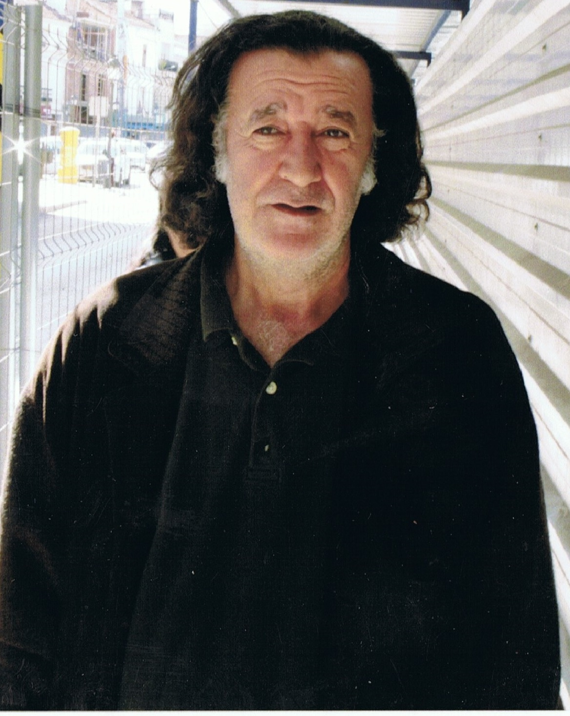 Dionisio Cañas